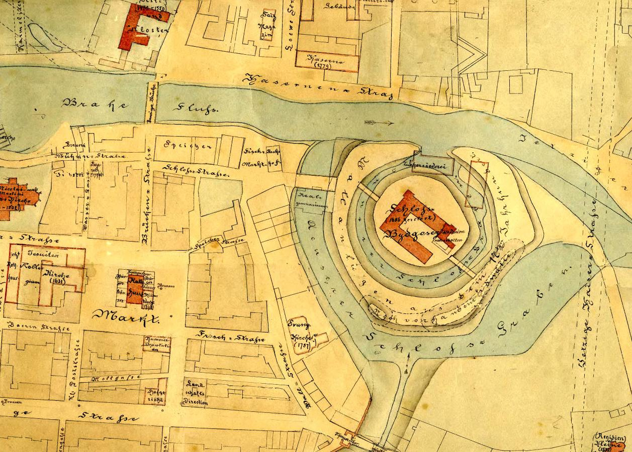 Lageplan der Stadt und Burg Bromberg (Bydgoszcz) mit ihren im 16, 17 und 18 Jahrhundert vorhandenen Bauanlagen. Nach alten Karten, den noch heute erhaltenen Ueberresten der Bauwerke und örtlichen Ermittelungen angefertigt für den hiesigen historischen Verein im Jahre 1890